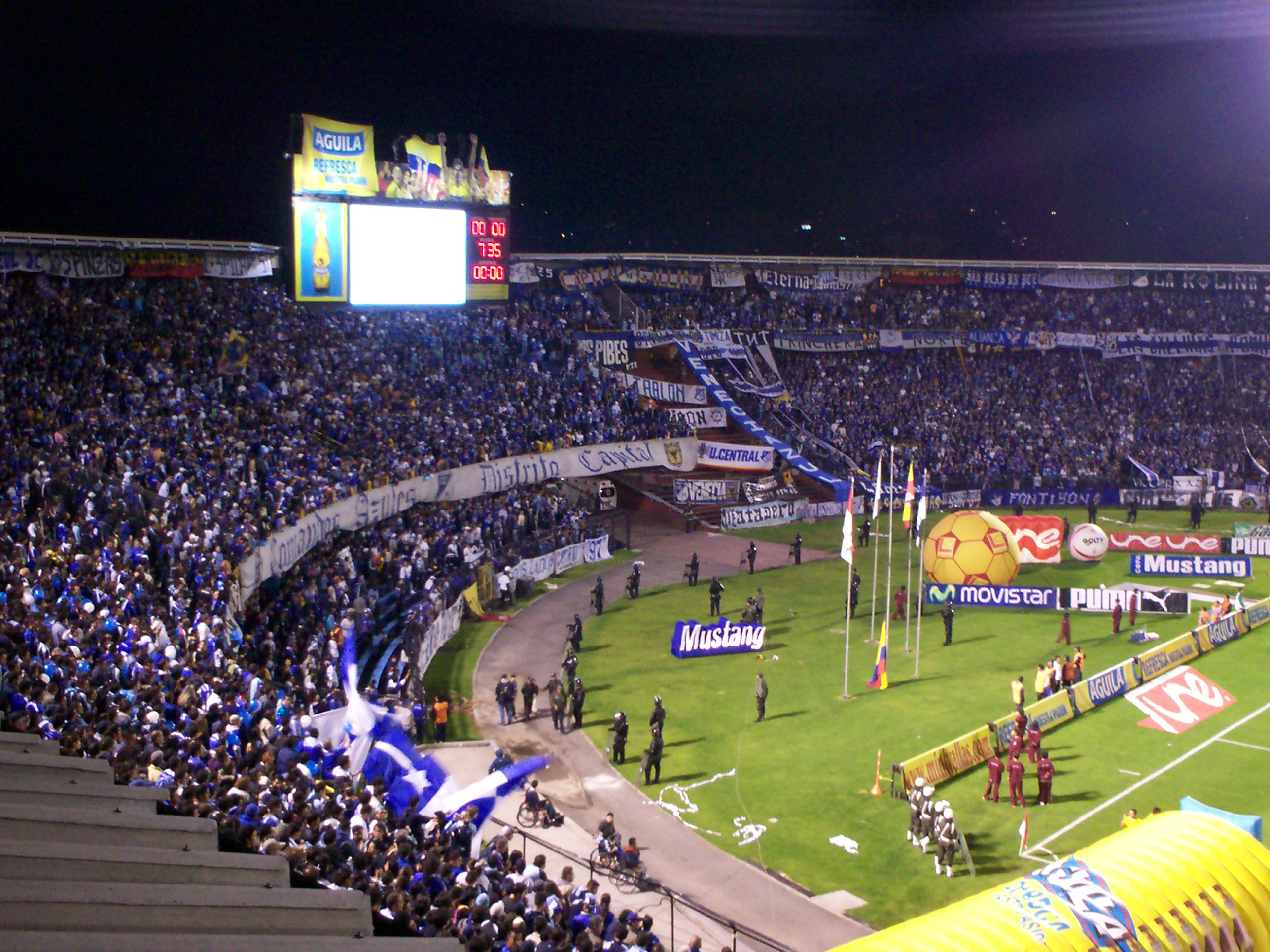 Final Torneo Finalización 2012 #1